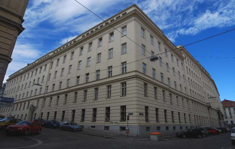 Marokkanerkaserne in der Marokkanergasse, früher eine Militärkaserne, heute Eigentum des Innenministeriums